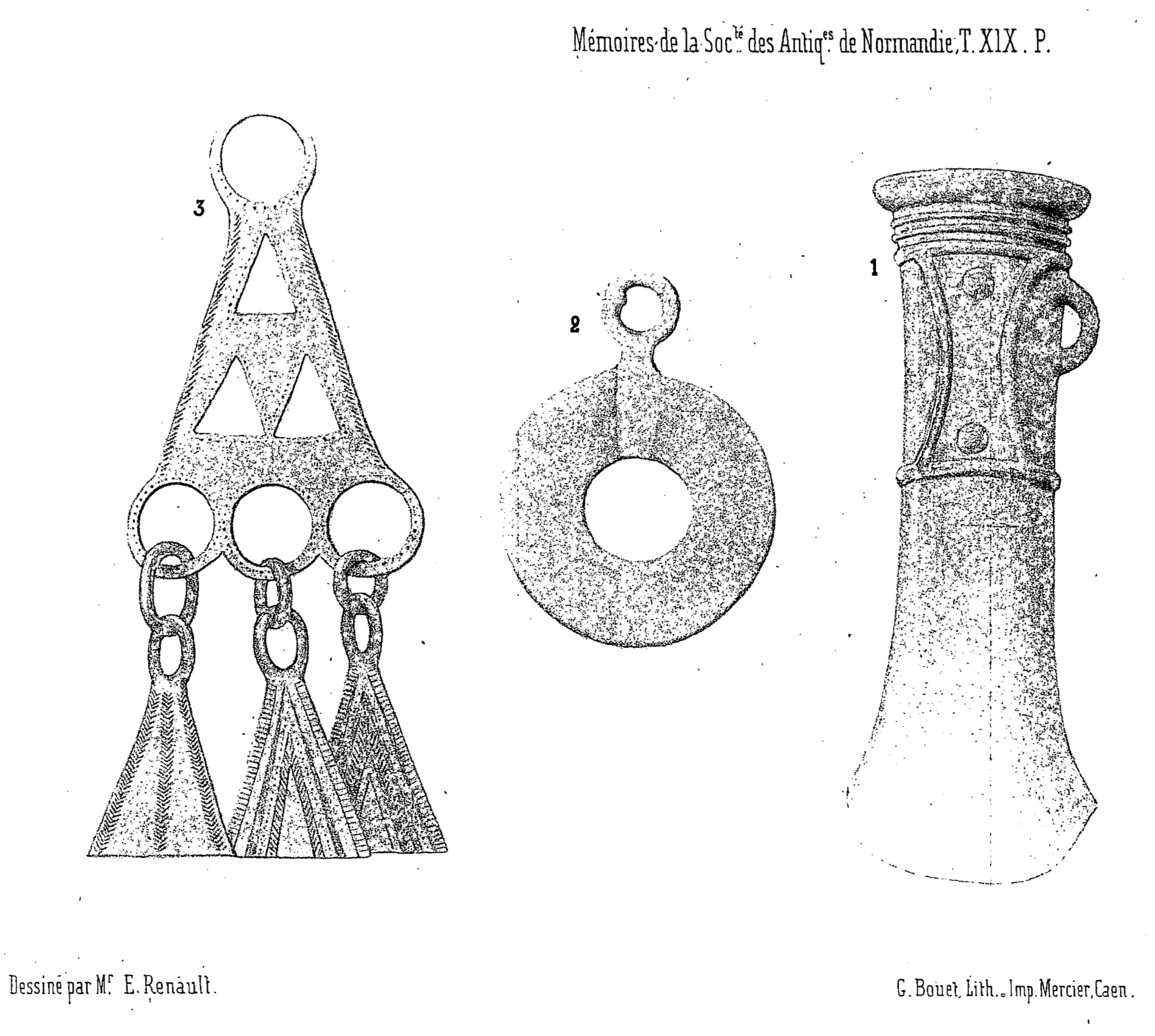 gravures d'objets antiques découverts à Notre-Dame-de-Livoye en 1851